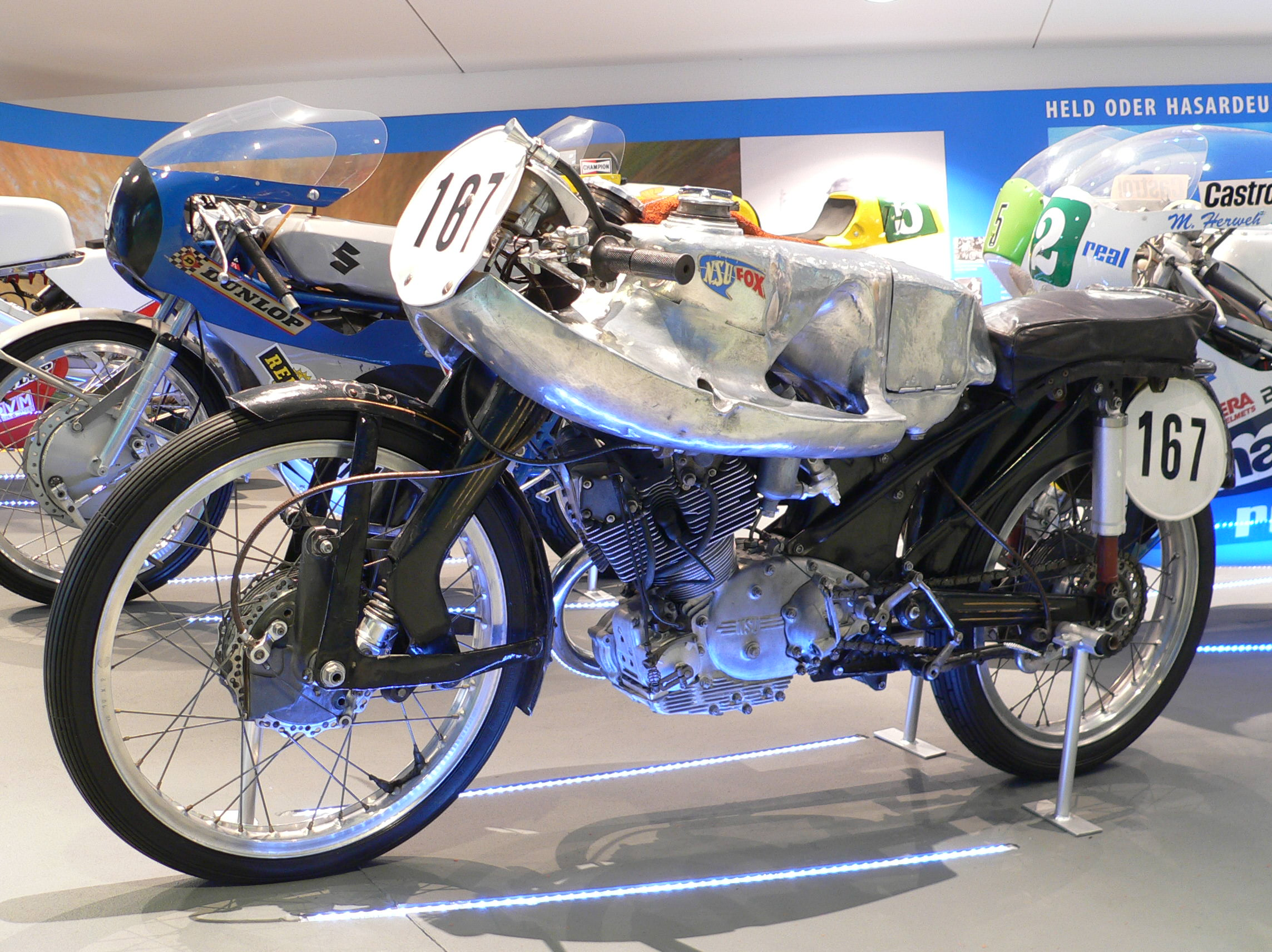 Racing Motorbike "NSU Rennfox R11" (1953) at the Deutsches Zweirad- und NSU-Museum (124 cm³, Einzylinder-Viertakt (dohc), Sechsgang-Getriebe, 16 PS bei 11.000 U/Min., 83 Kg, 165 Km/h) with this motorcycle Werner Haas won german & world championchip 1953